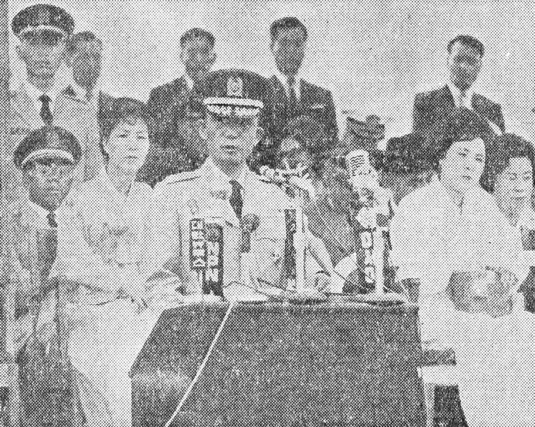 1963년 8월 30일 박정희 대장 예편